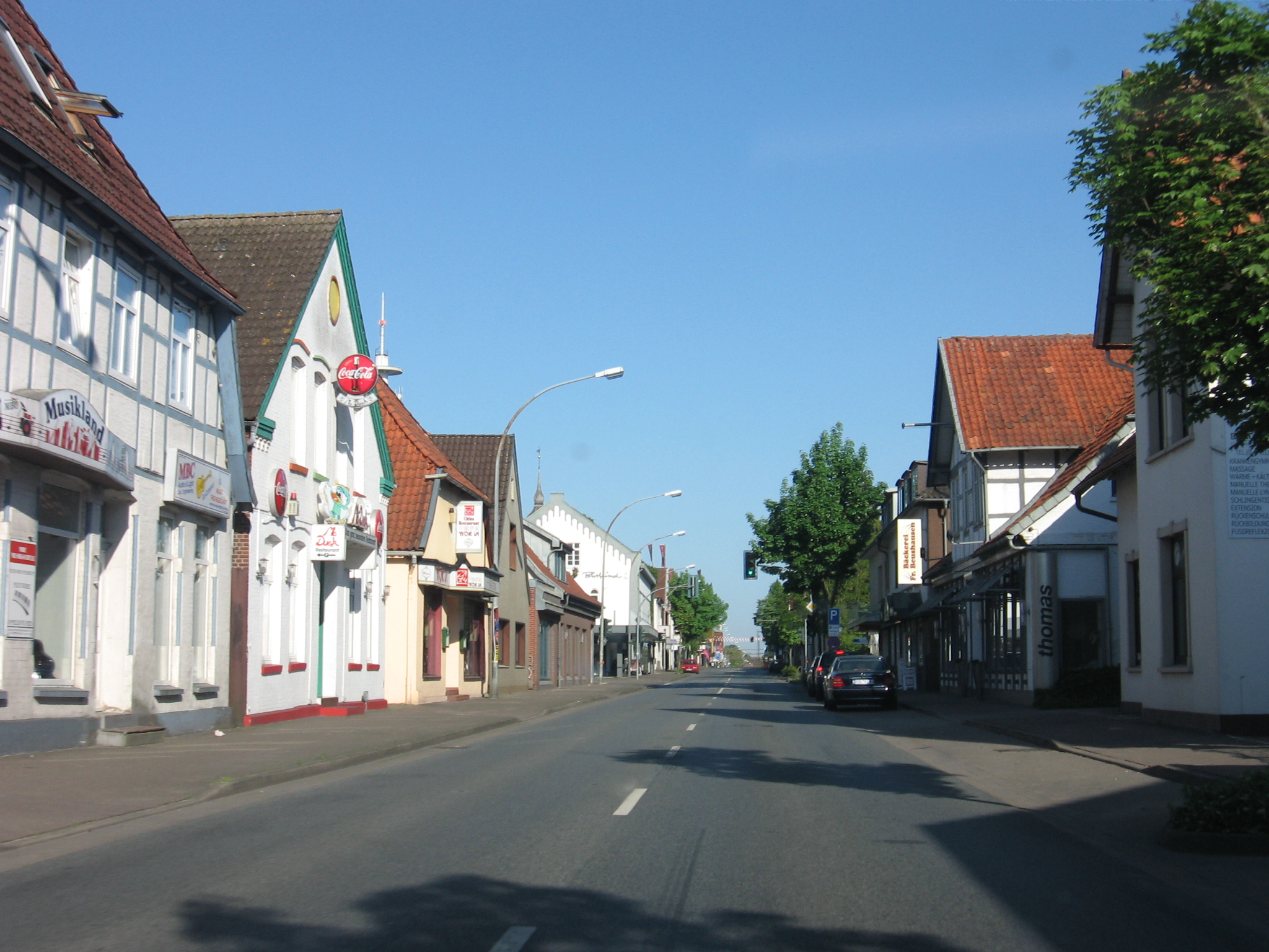 Bremervörde